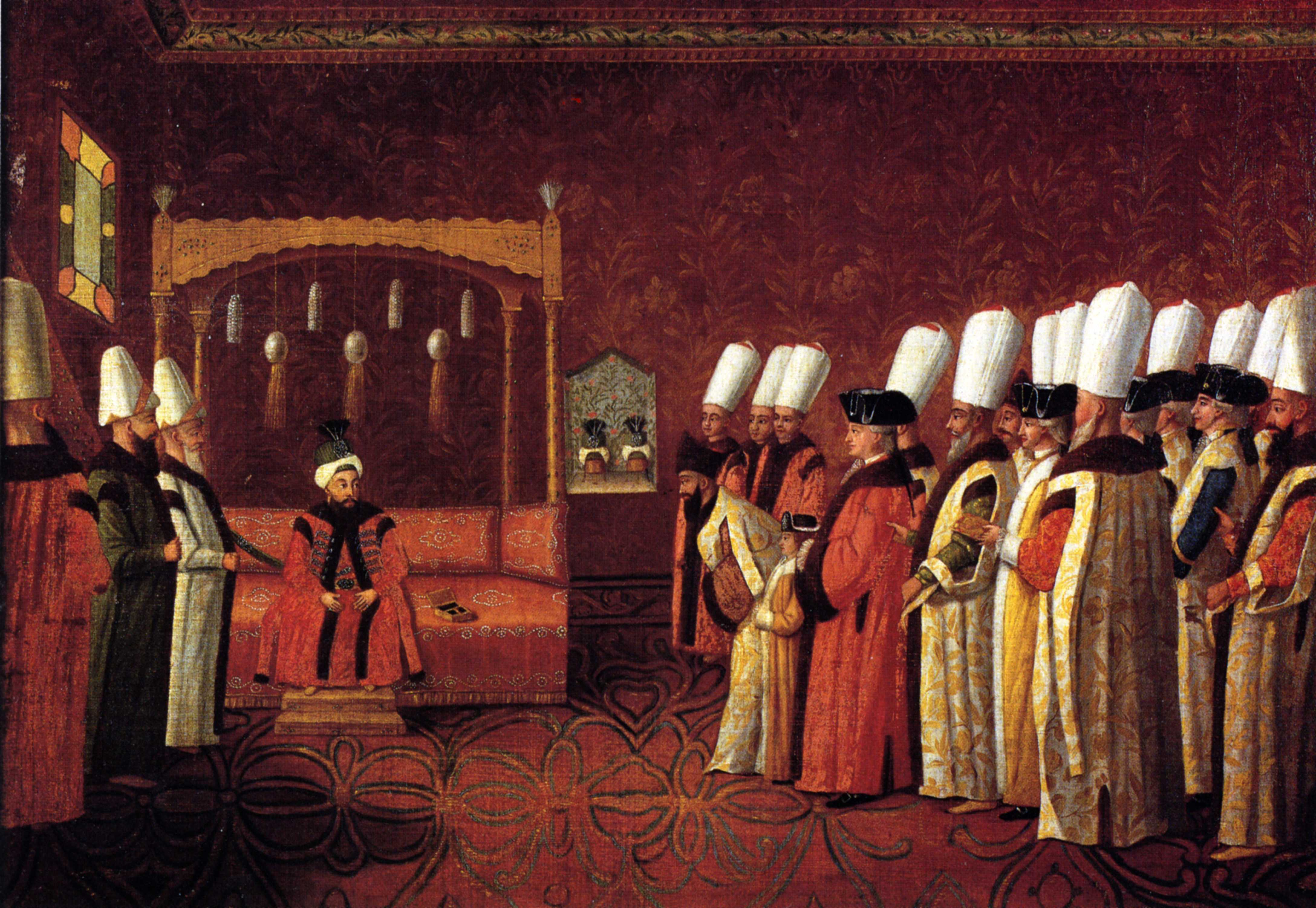 Ambassadeur Van Dedem, vergezeld door zijn 11-jarige zoon Anthony, werd op 28 november 1785 ontvangen door sultan Abdülhamid I.